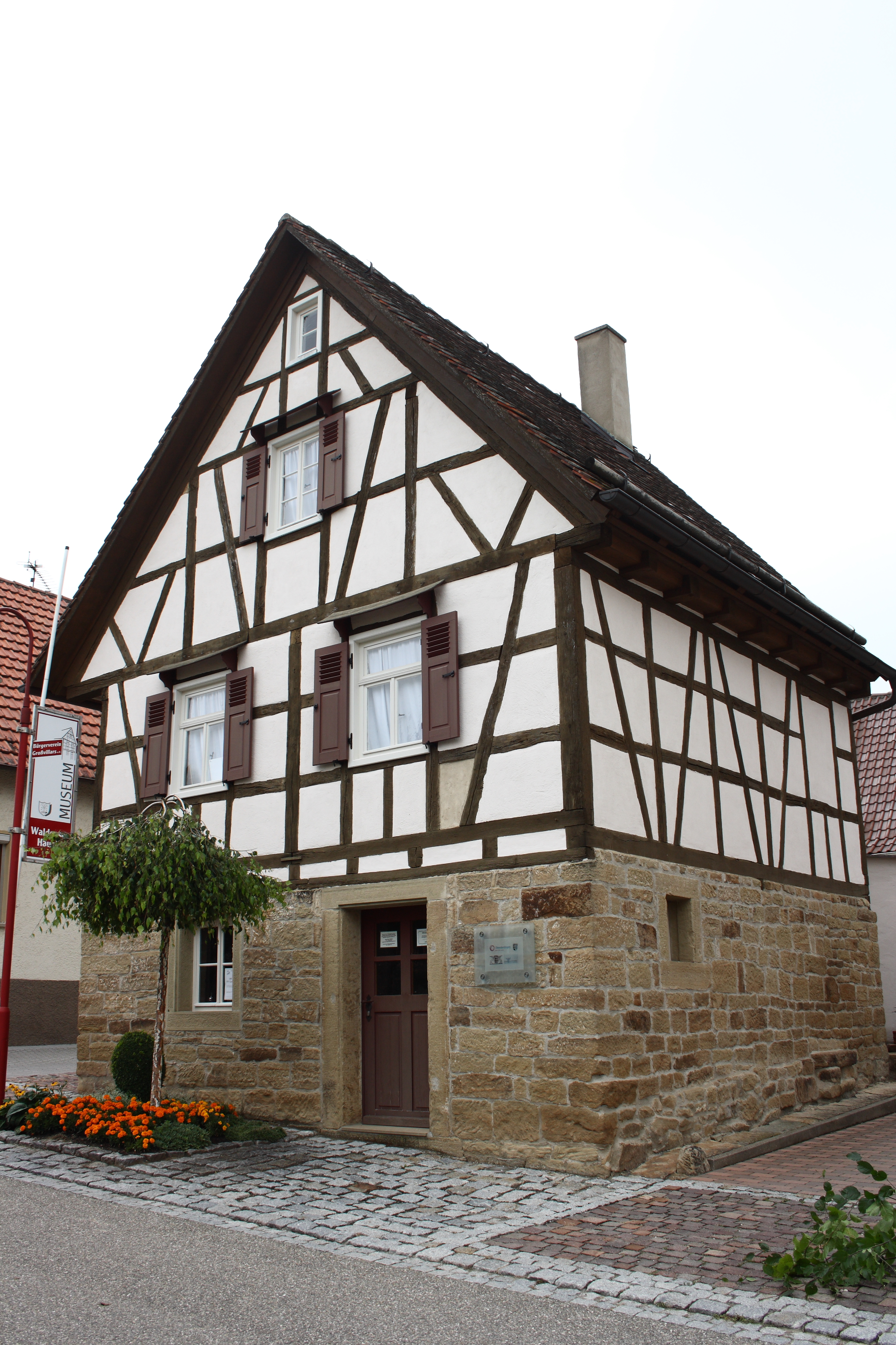 Waldenserhäusle in Oberderdingen, Freudensteiner Straße 45